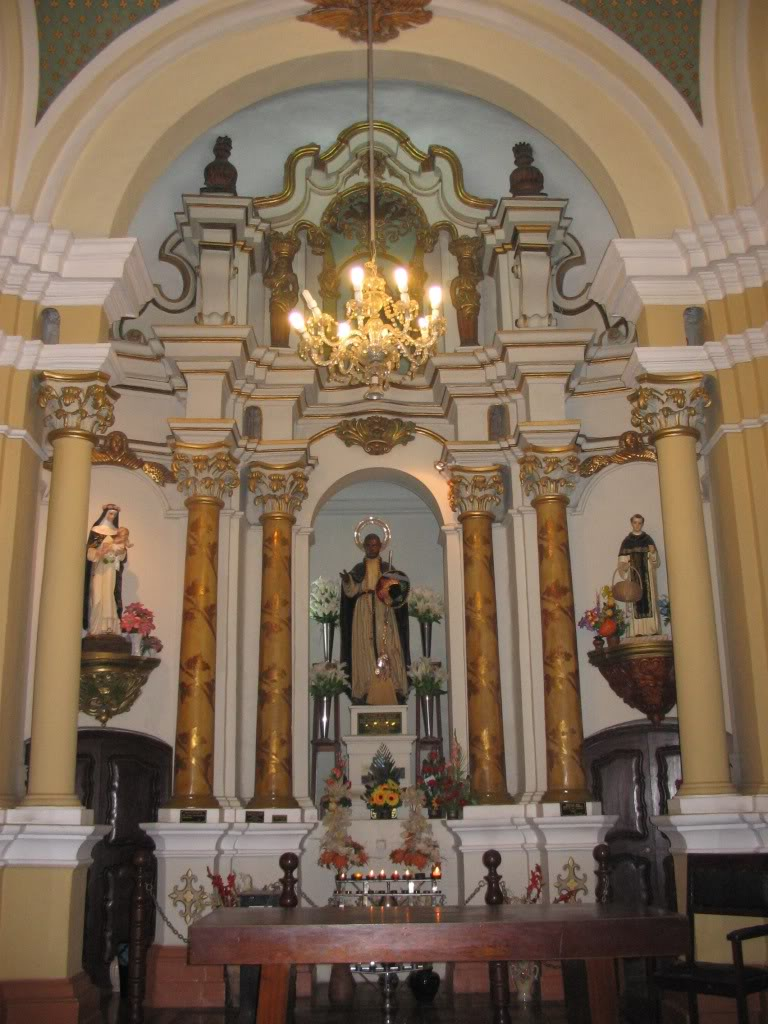 Conveto de Santo Domingo: antigua celda de San Martin de Porres